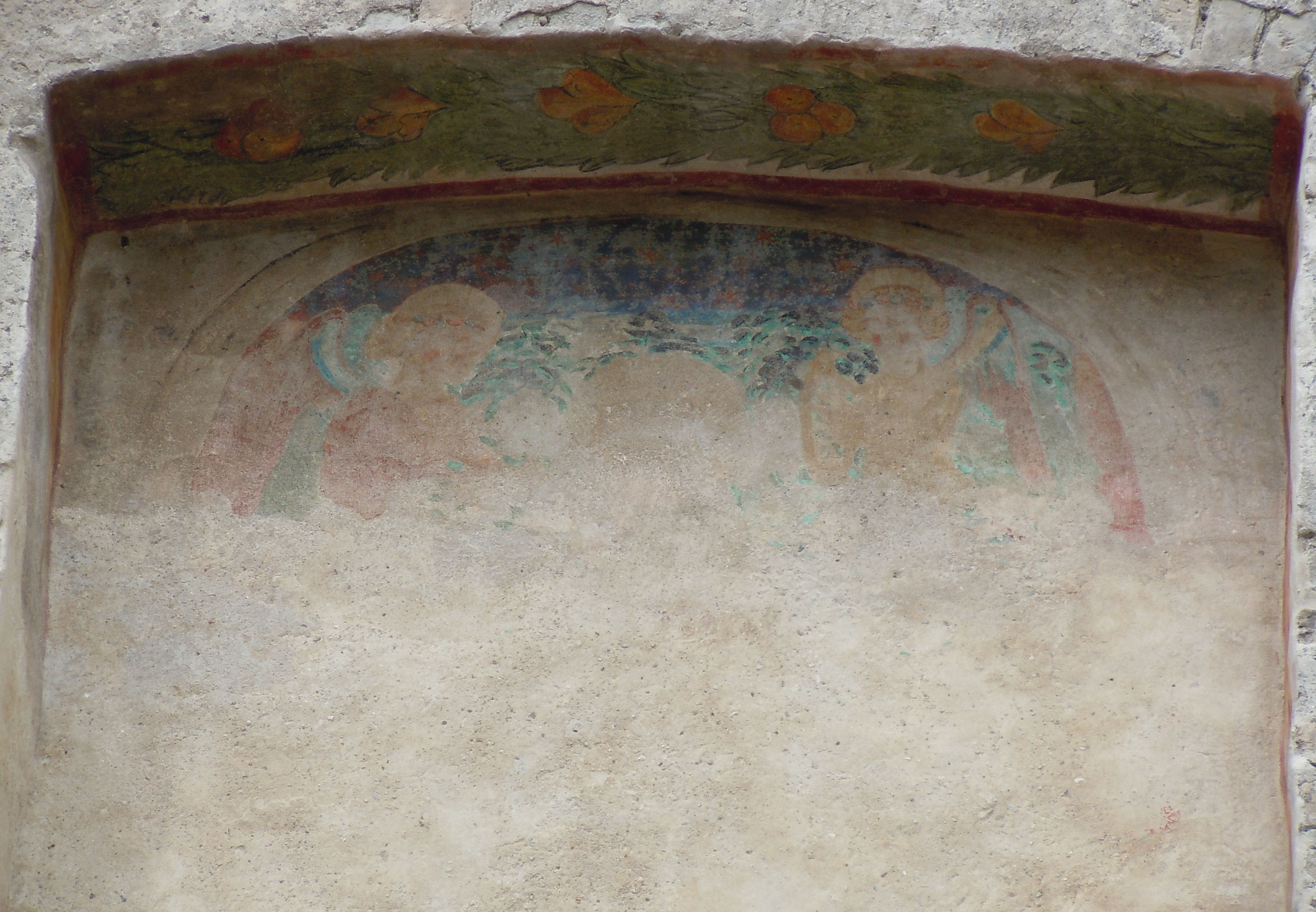 Casaloldo, Torre Casalodi, Tracce di affresco sulla facciata di Via Dante.